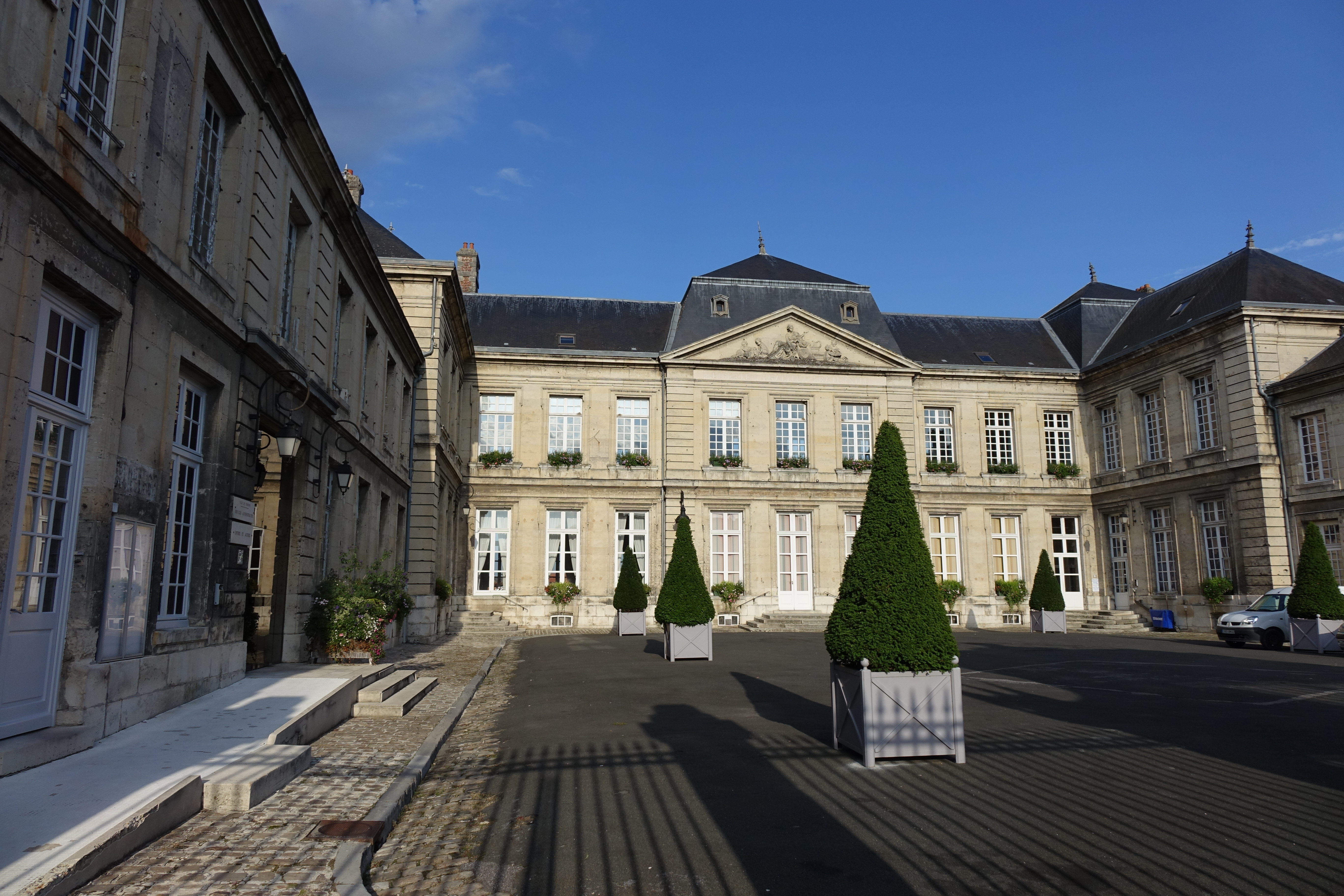 Hôtel de ville de Soissons, Aisne, France .